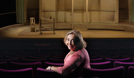 ליא קניג שטופלר - תיאטרון